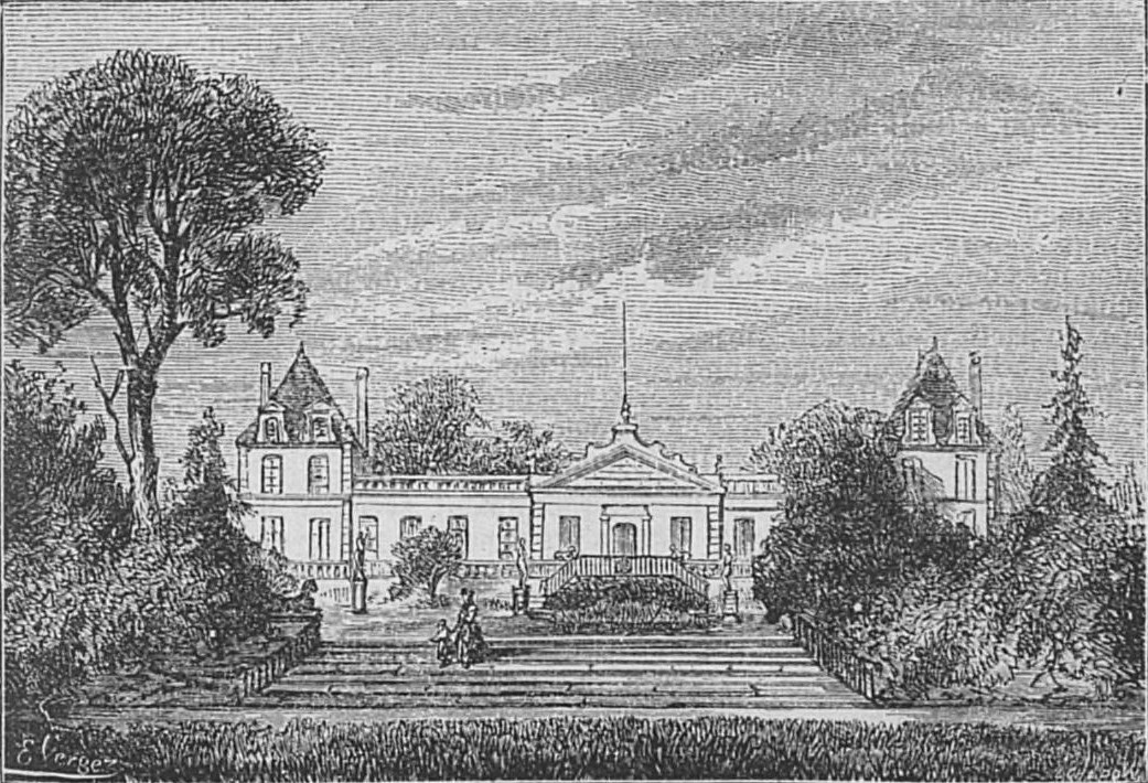 Illustration du Château Beychevelle dans l'ouvrage Bordeaux et ses vins (6ème édition) de Charles Cocks et Edouard Féret publié en 1893